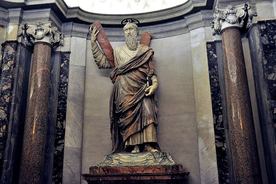 Monumentalfigur des hl. Andreas im Petersdom, Rom